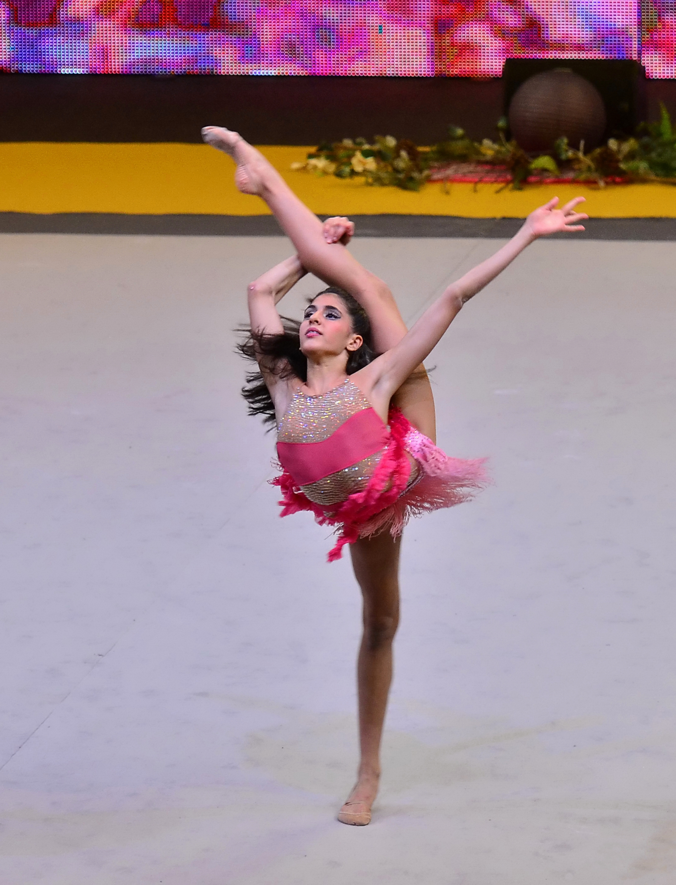 Mónica Alonso en una exhibición durante el Euskalgym 2013 en el Bilbao Arena el 10 de noviembre de 2013.